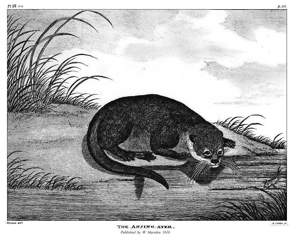 Anjing Ayer II